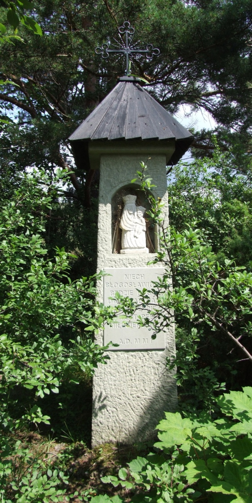 Kapliczka na Rusinowskim Wierchu w Jaworkach